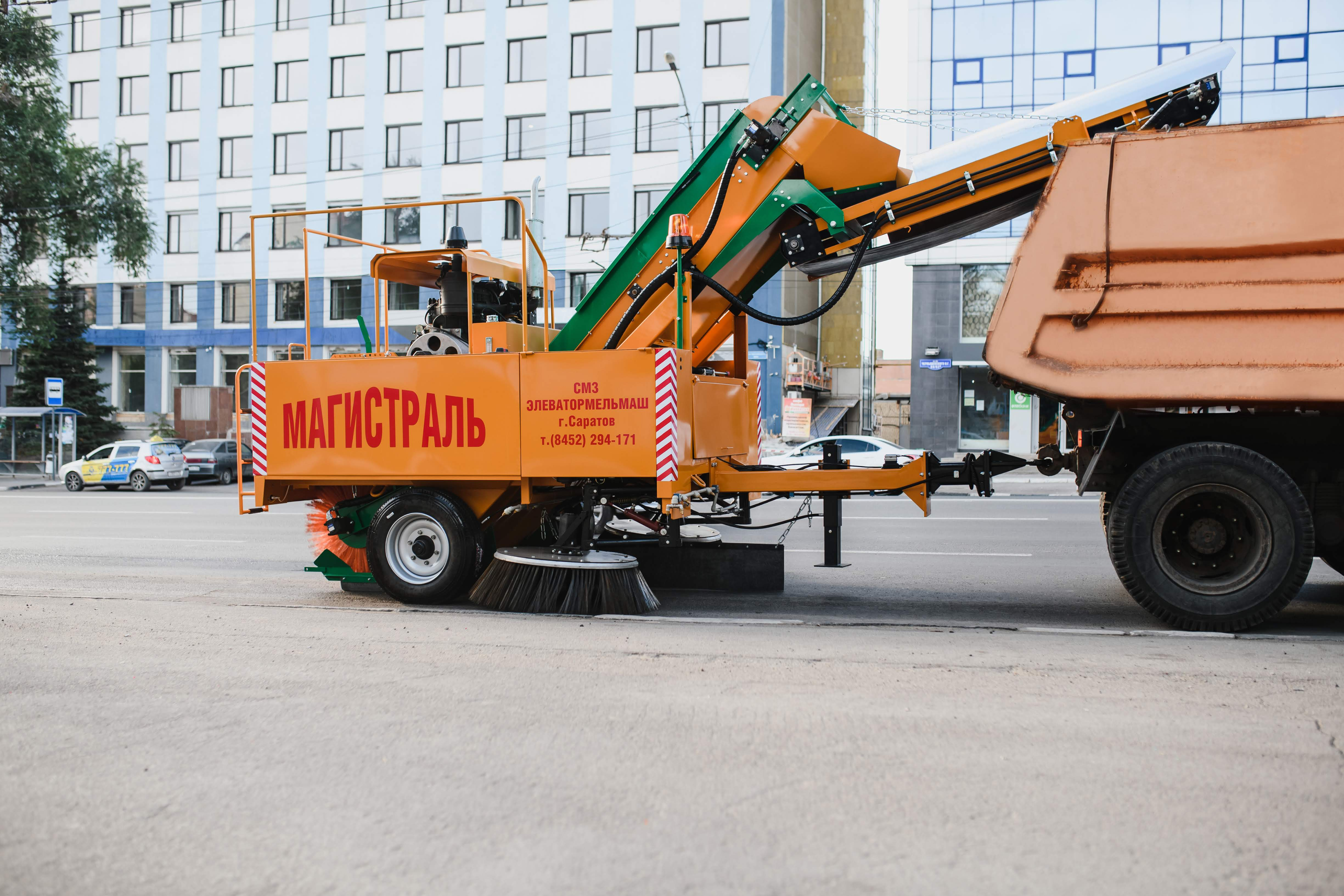 ПУМ-001 "Магистраль" прицепная подметально-уборочная машина элеваторного типа. Предназначена для тяжелой и скоростной уборки крупных транспортных магистралей и городских улиц, рыночных и привокзальных площадей. производство ОАО "СМЗ "Элеватормельмаш" (РФ, г. Саратов)